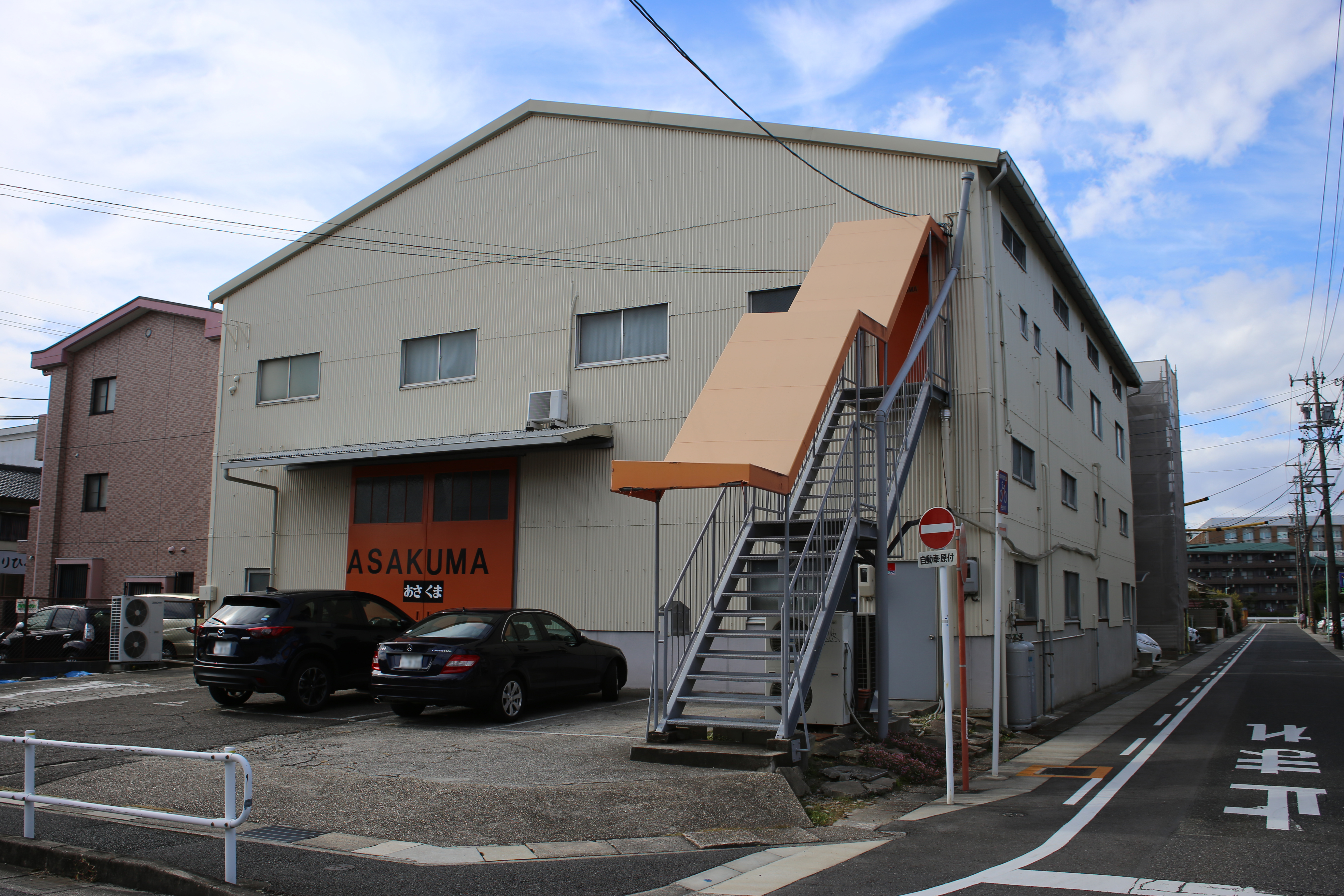 名古屋市天白区植田西のあさくま本社を東側公道北側より撮影。ただし、ナンバープレートにつき画像処理済。